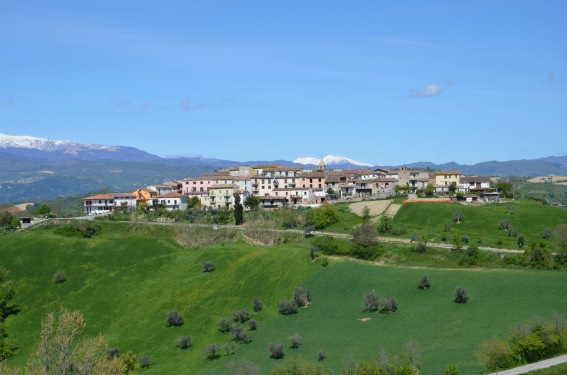 Vista del comune di Castel Castagna